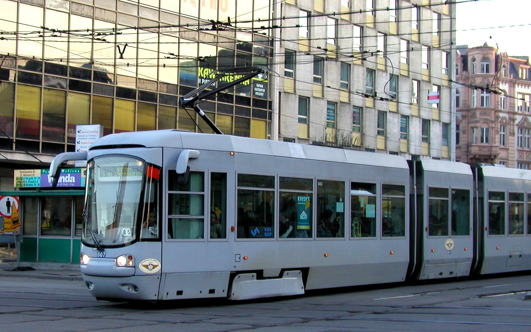 autor: Stimoroll title: Tramwaj Karlik